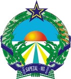 Brasão da cidade de Sapezal